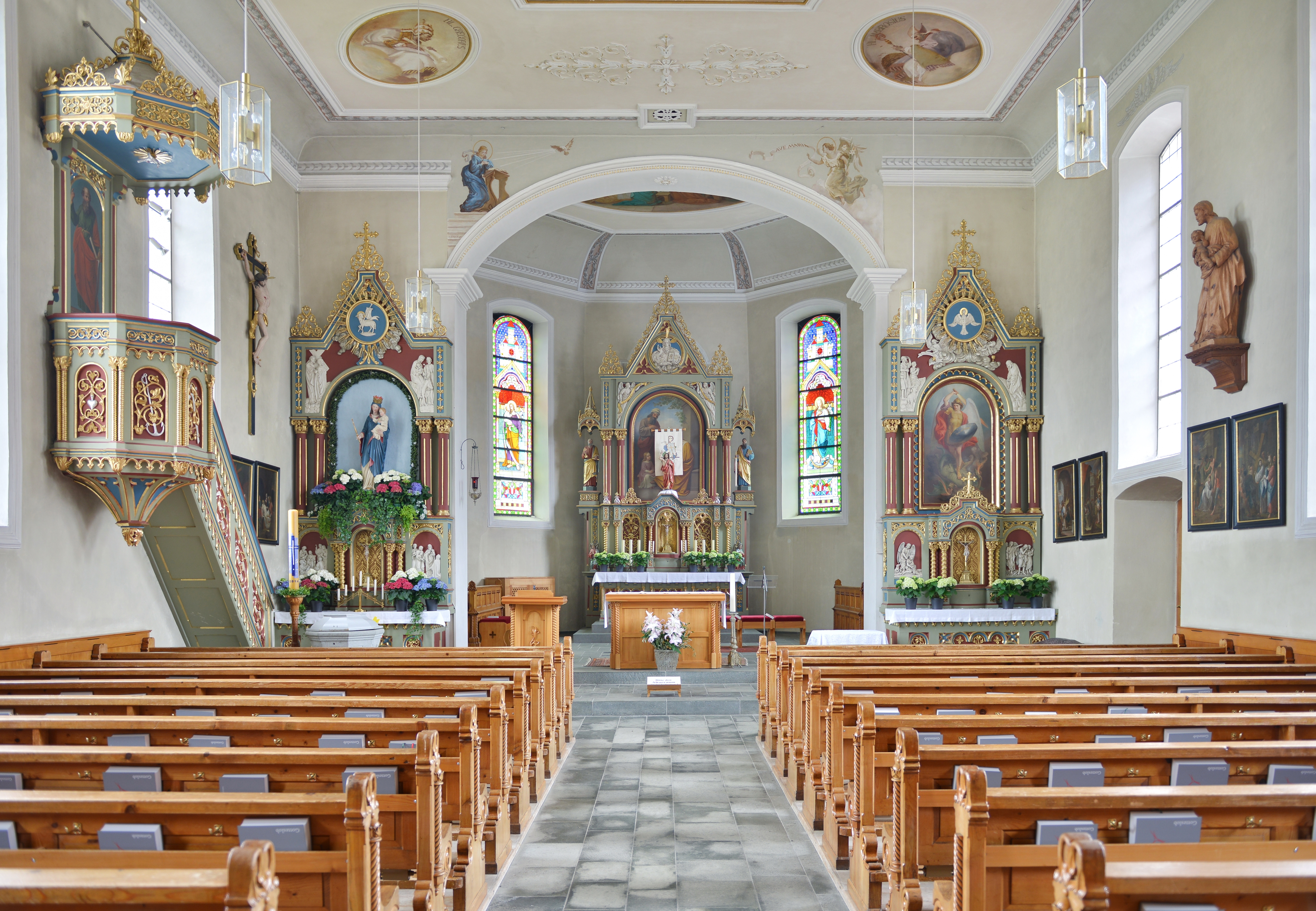 Annakirche in Mittelberg-Hirschegg, Kleinwalsertal.